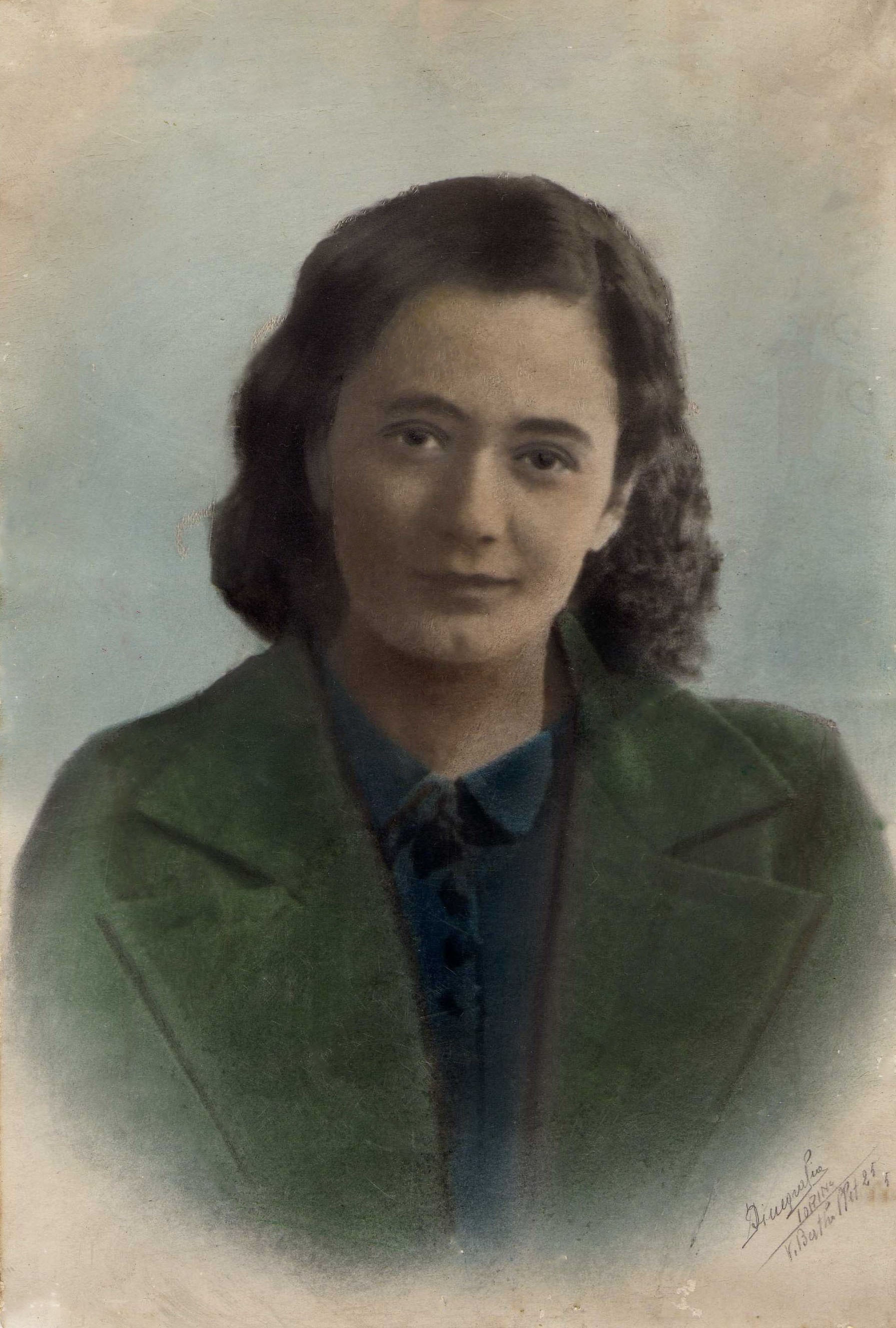 Portreti i Hatixhe Alizotit